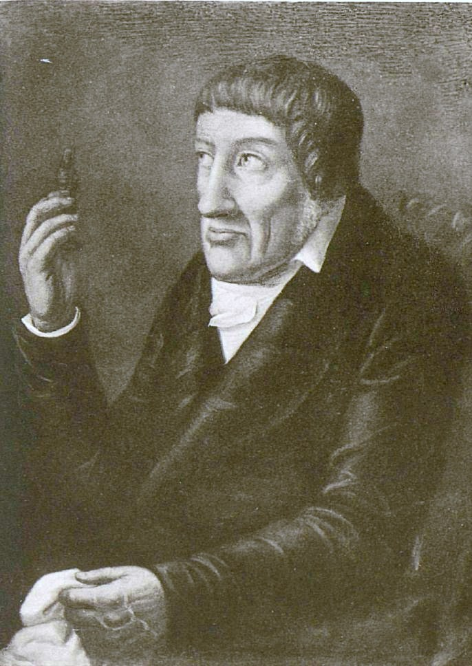 Граф Григорий Кириллович Разумовский (1759—1837), геолог, ботаник, литератор.